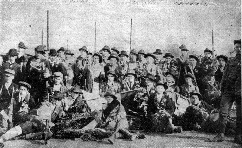 Członkowie Sokoła w Dziedzicach przed wymarszem.